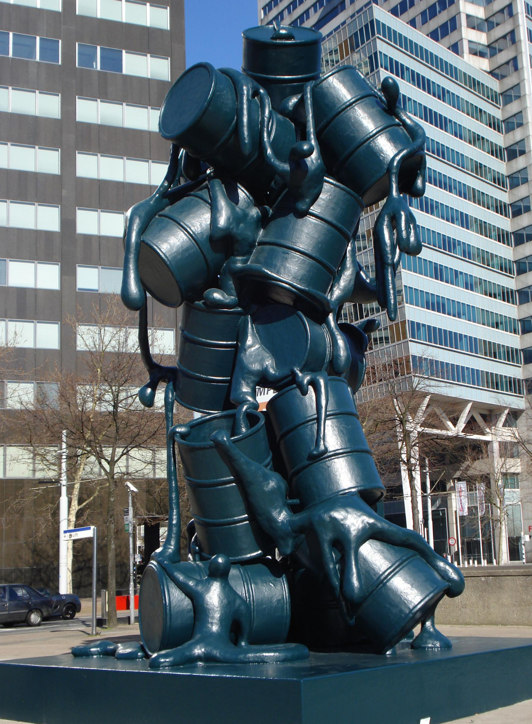 Rotterdam, Churchillplein. Kunstwerk "Cascade" van Joep van Lieshout. 6 maart 2010. Rotterdam/The Netherlands.